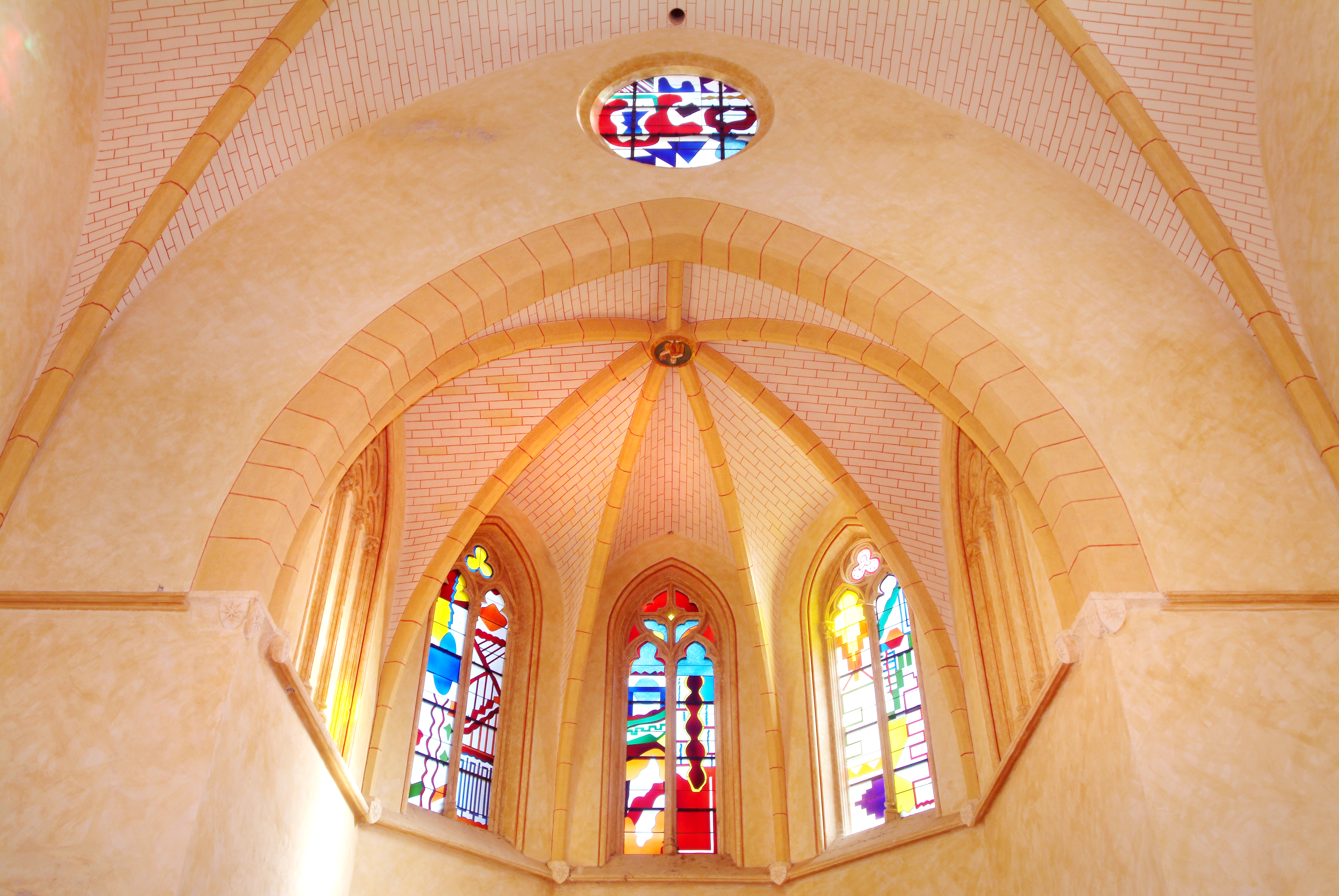 VITRAUX DE SHIRLEY JAFFE